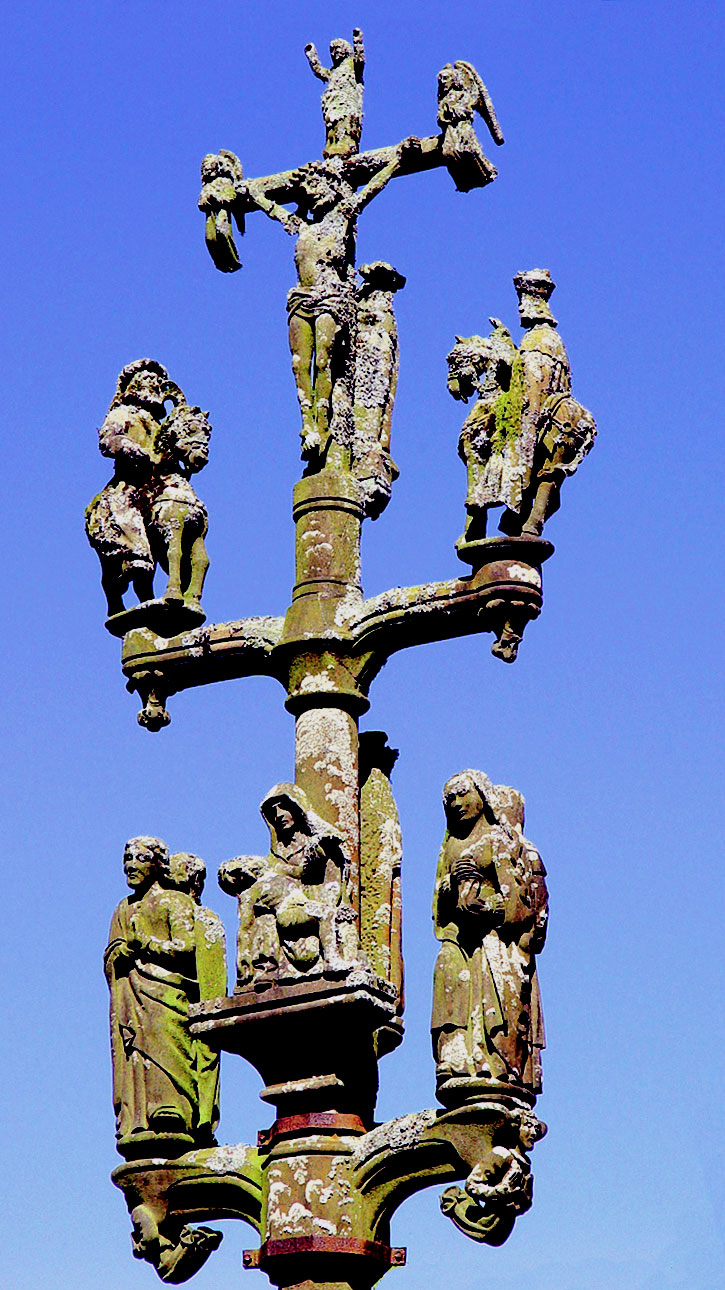 Pencran (Bretagne, Finistère) Calvaire